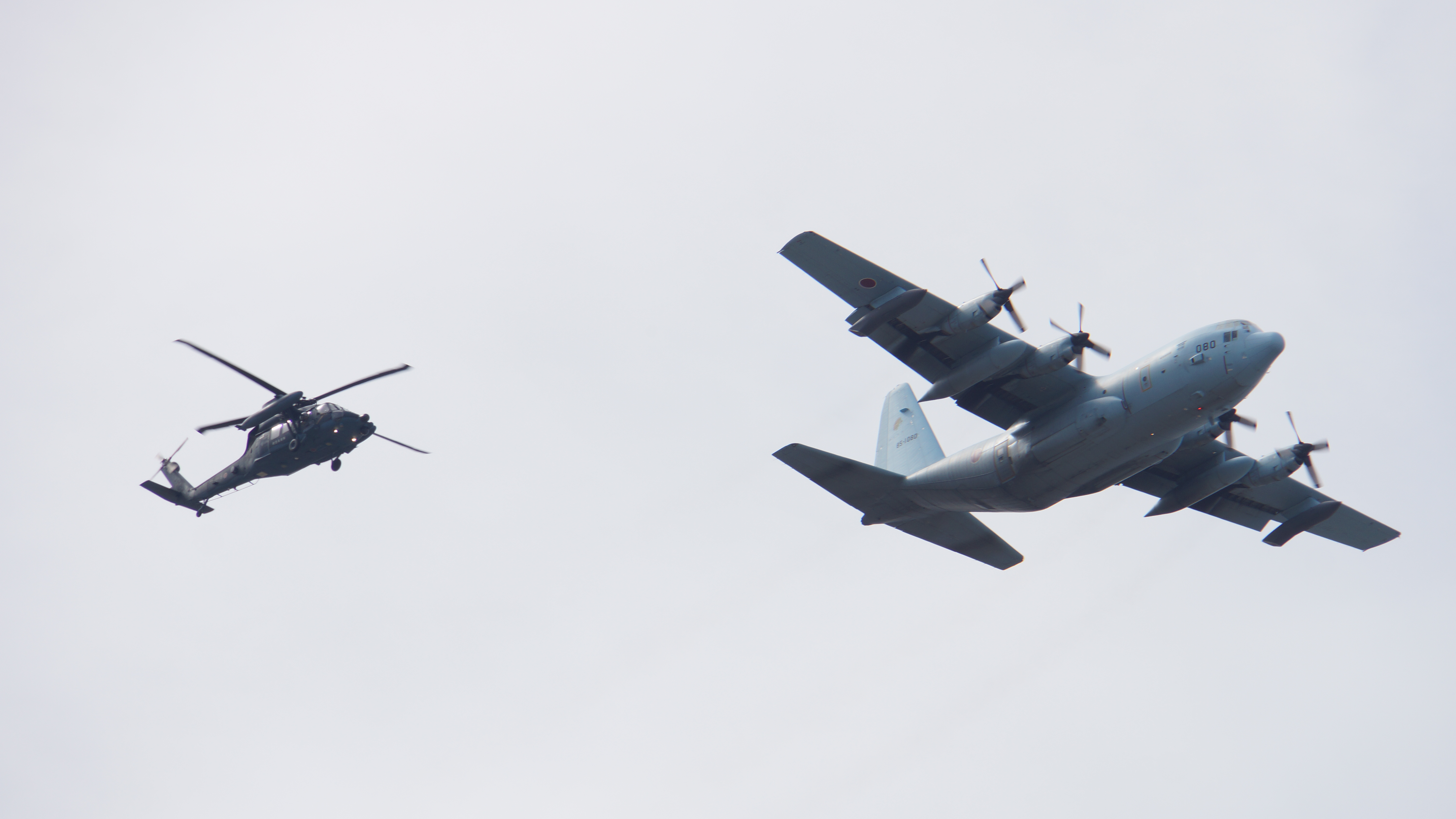 航空自衛隊 模擬空中給油飛行展示を行なうKC-130H（85-1080号機）とUH-60J（78-4567号機）。 2016年3月13日 小牧基地にて。